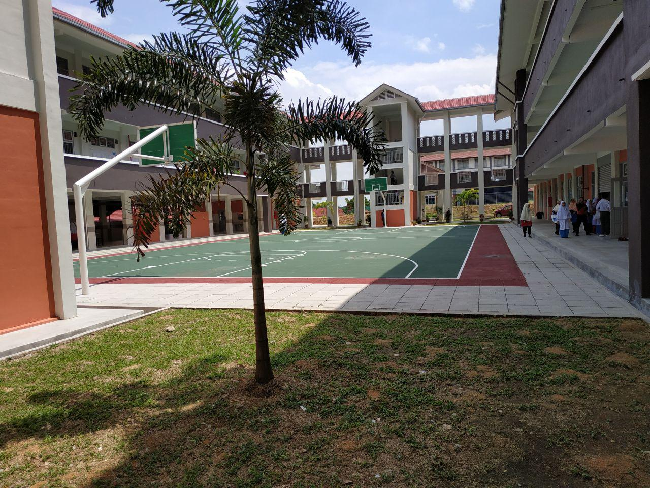 SMA JAIM ASSYAKIRIN